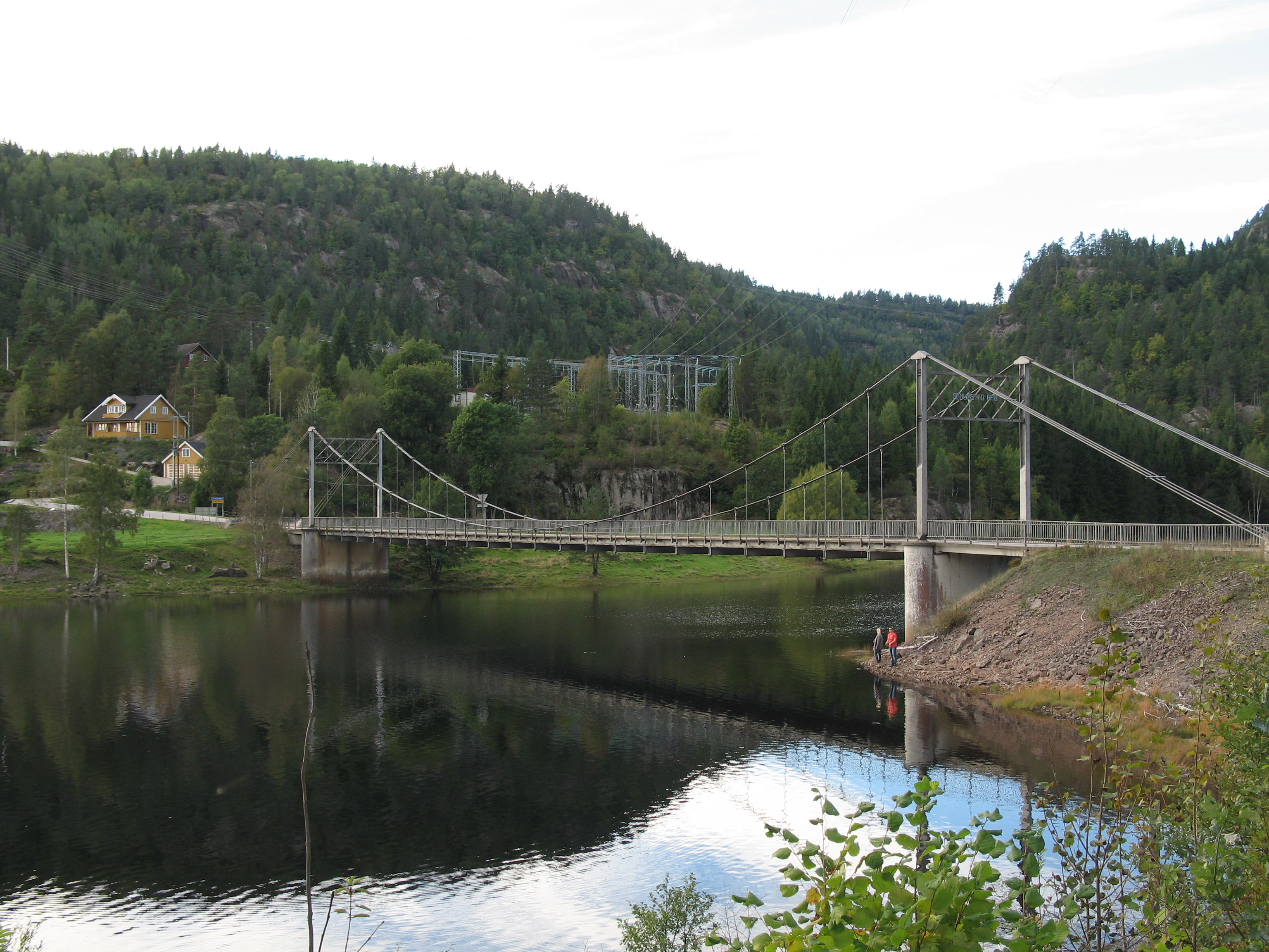 Senumstad bru over Sennumstadfjorden i Tovdalselva